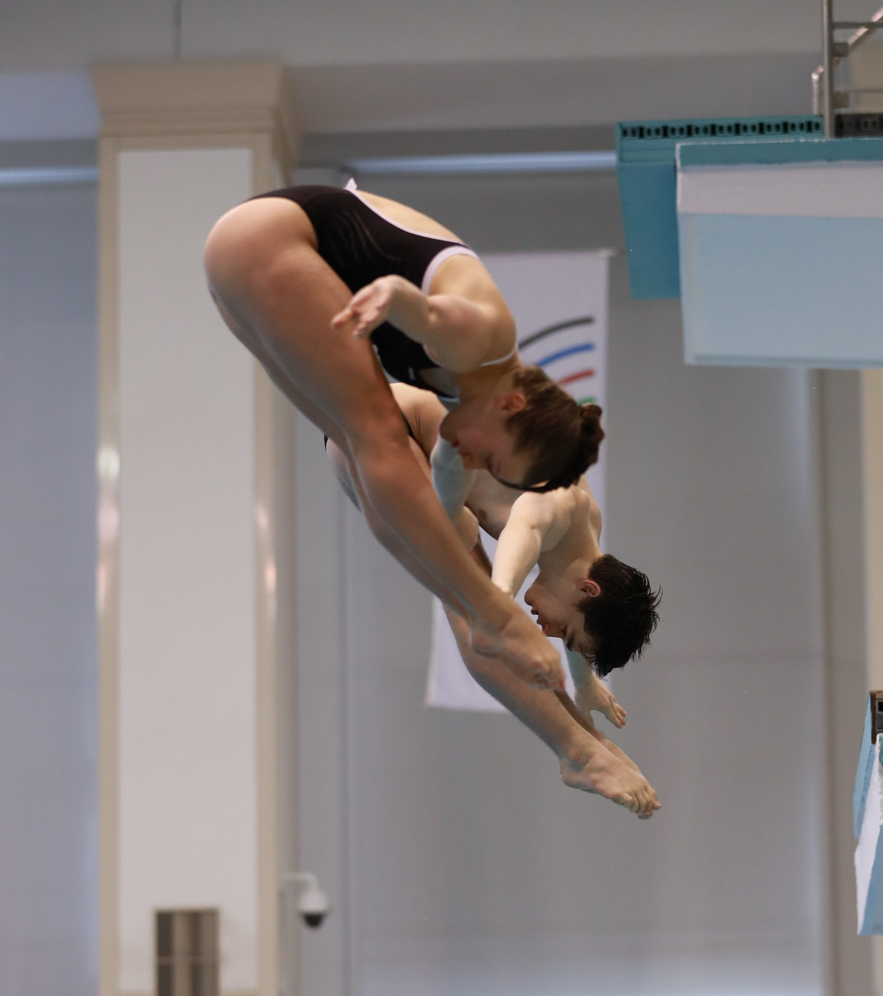 3m mixed Synchron Finale Sprung 1 bei den Internationalen Deutschen Hallenmeisterschaften im Wasserspringen Offene Klassen und Junioren. Abgebildet: Tina Punzel. Lou Massenberg.